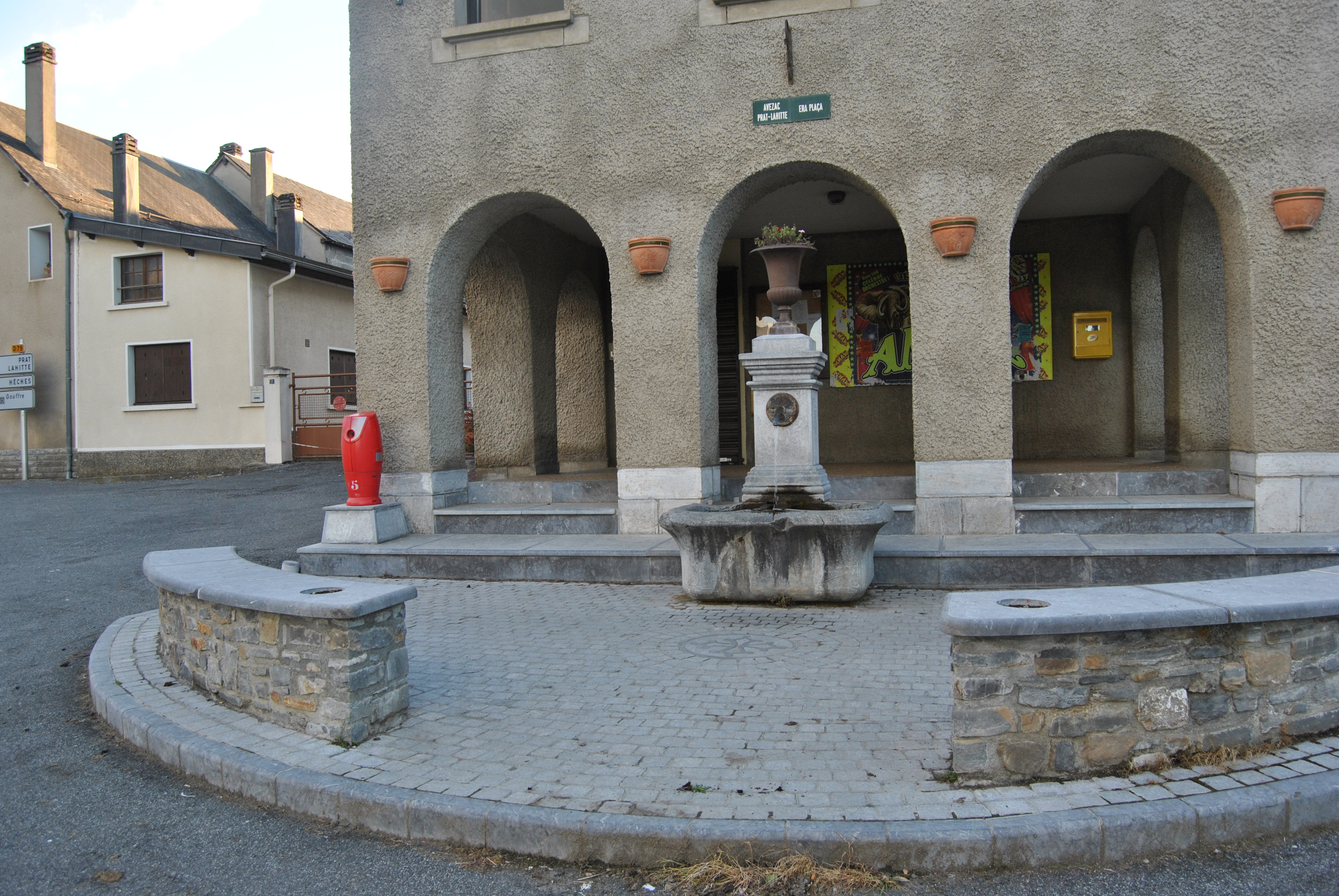 Place de la fontaine à Avezac